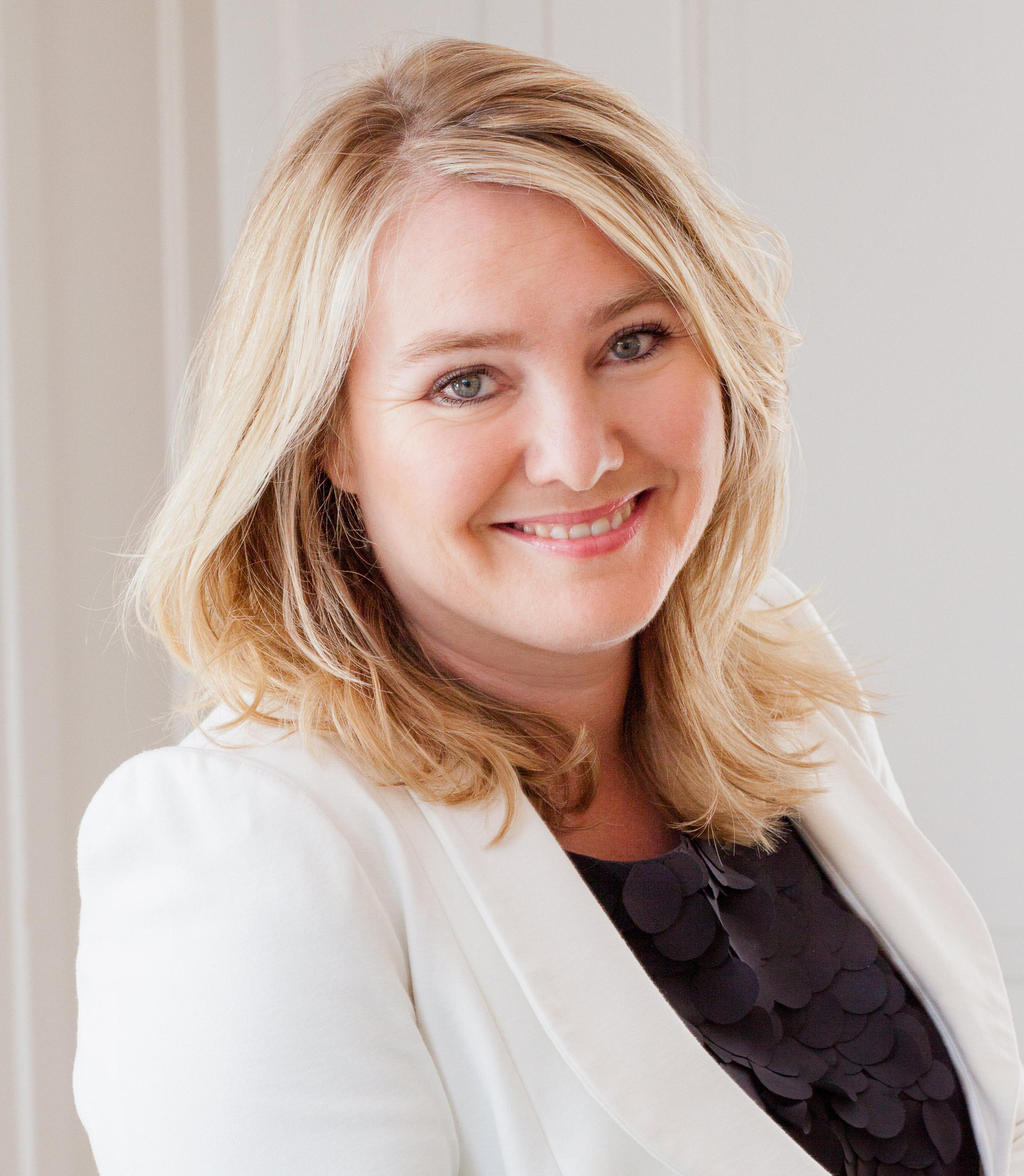 Minister van Infrastructuur en Milieu Melanie Schultz van Haegen